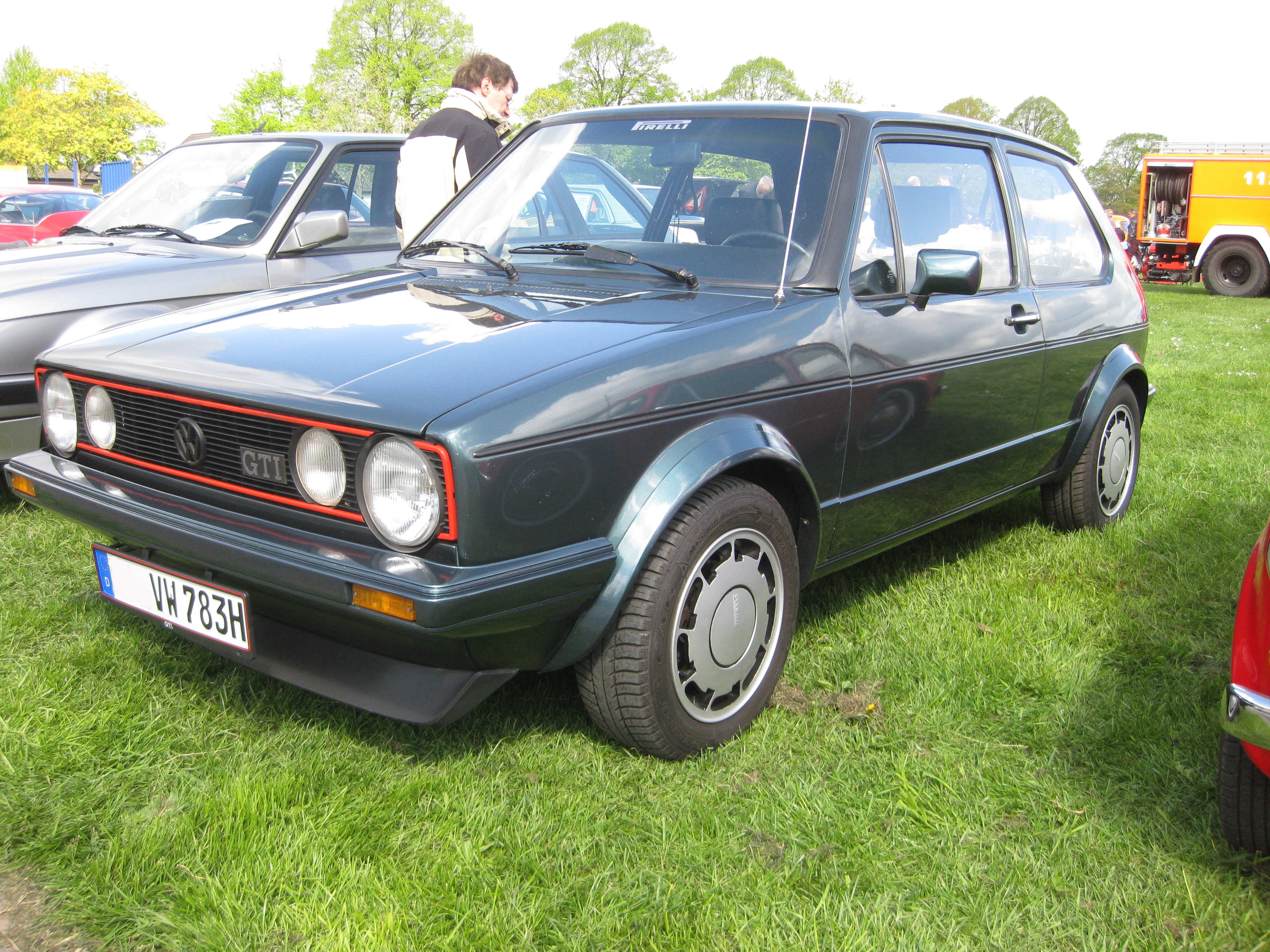 VW Golf I GTi Pirelli